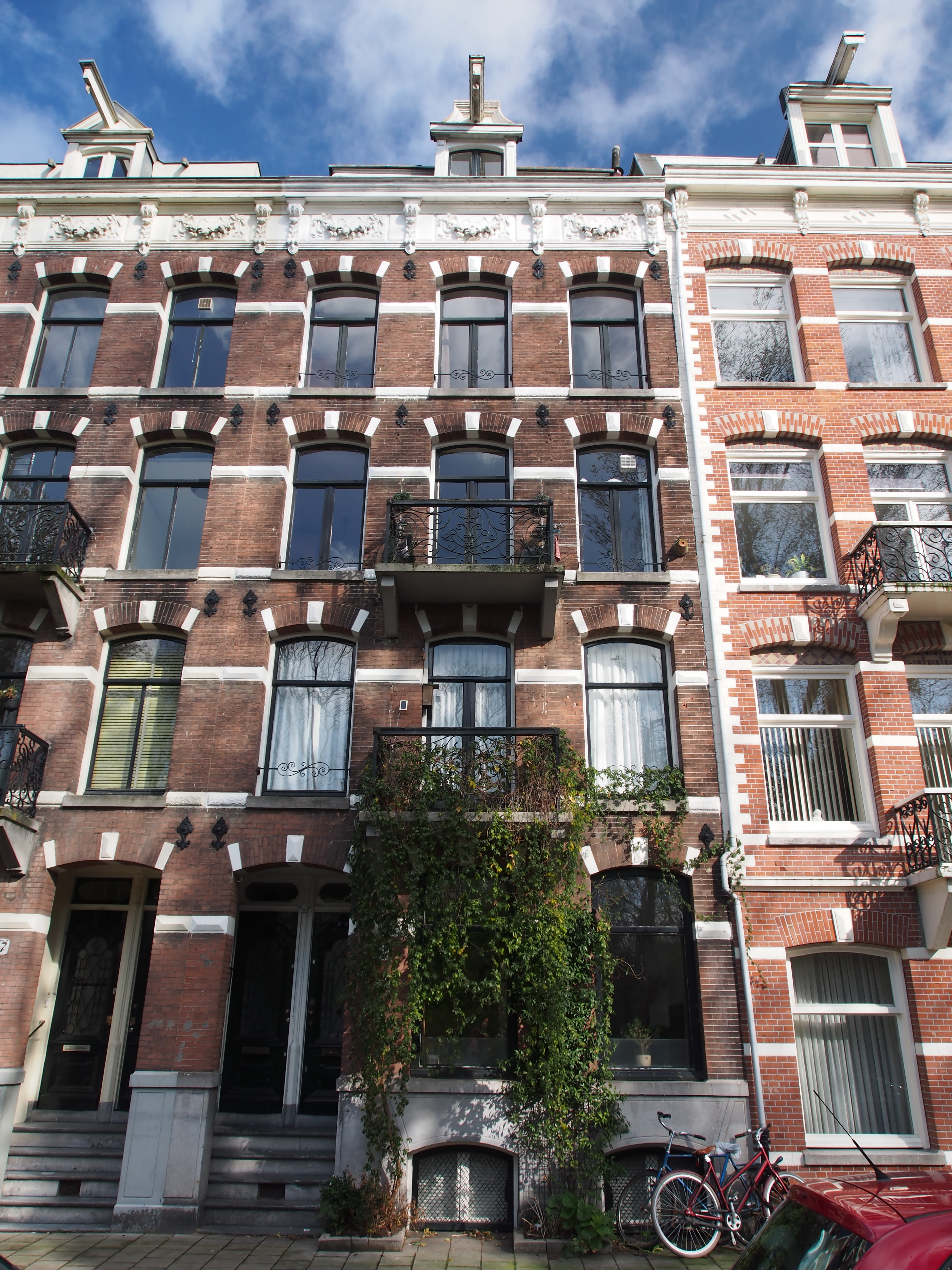 Monument in Amsterdam.